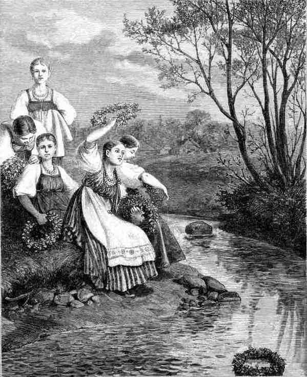 Троицын день в новгородской деревне. "Всемирная иллюстрация", №23, 1881.